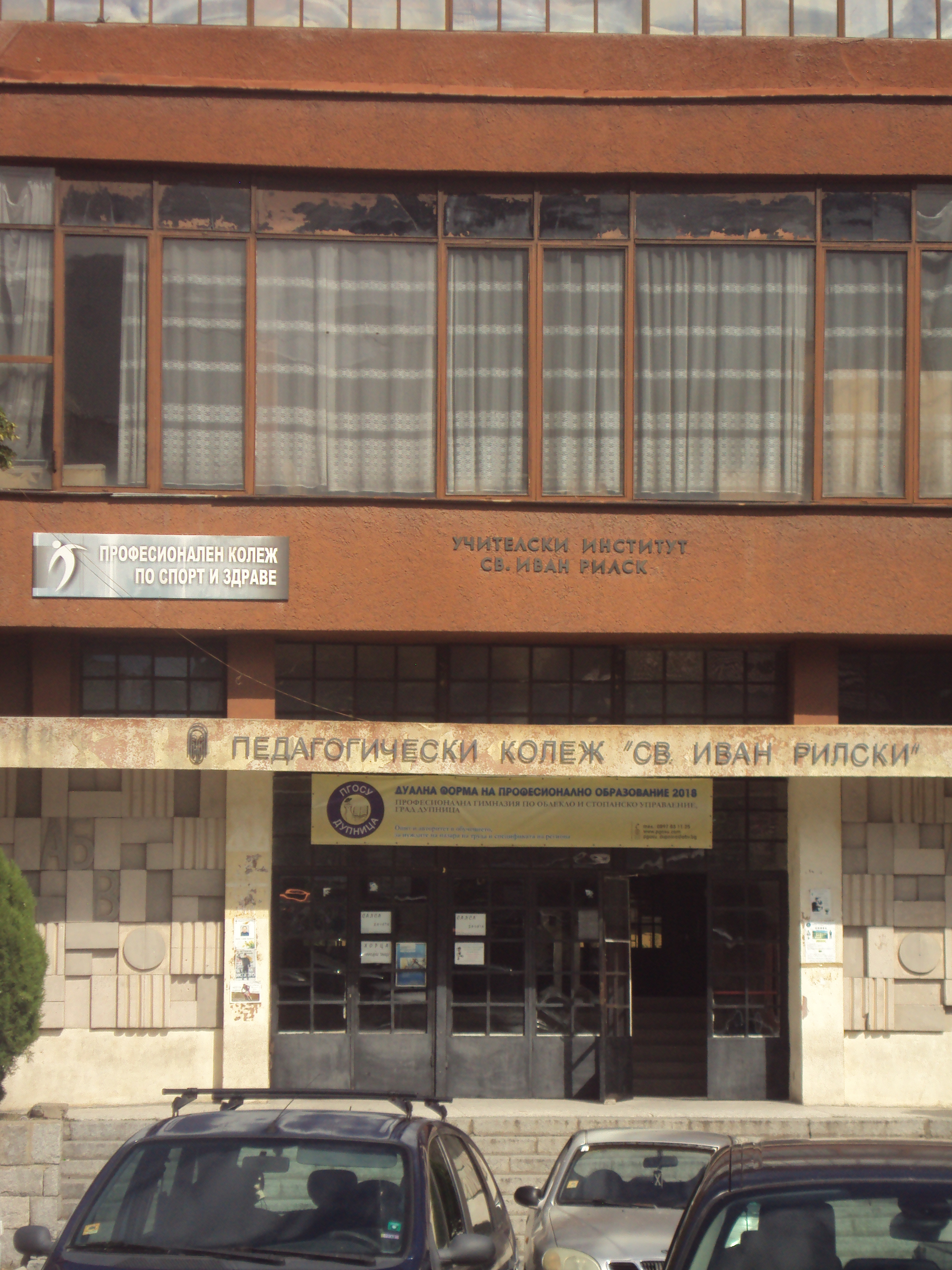 Професионална гимназия по облекло и стопанско управление